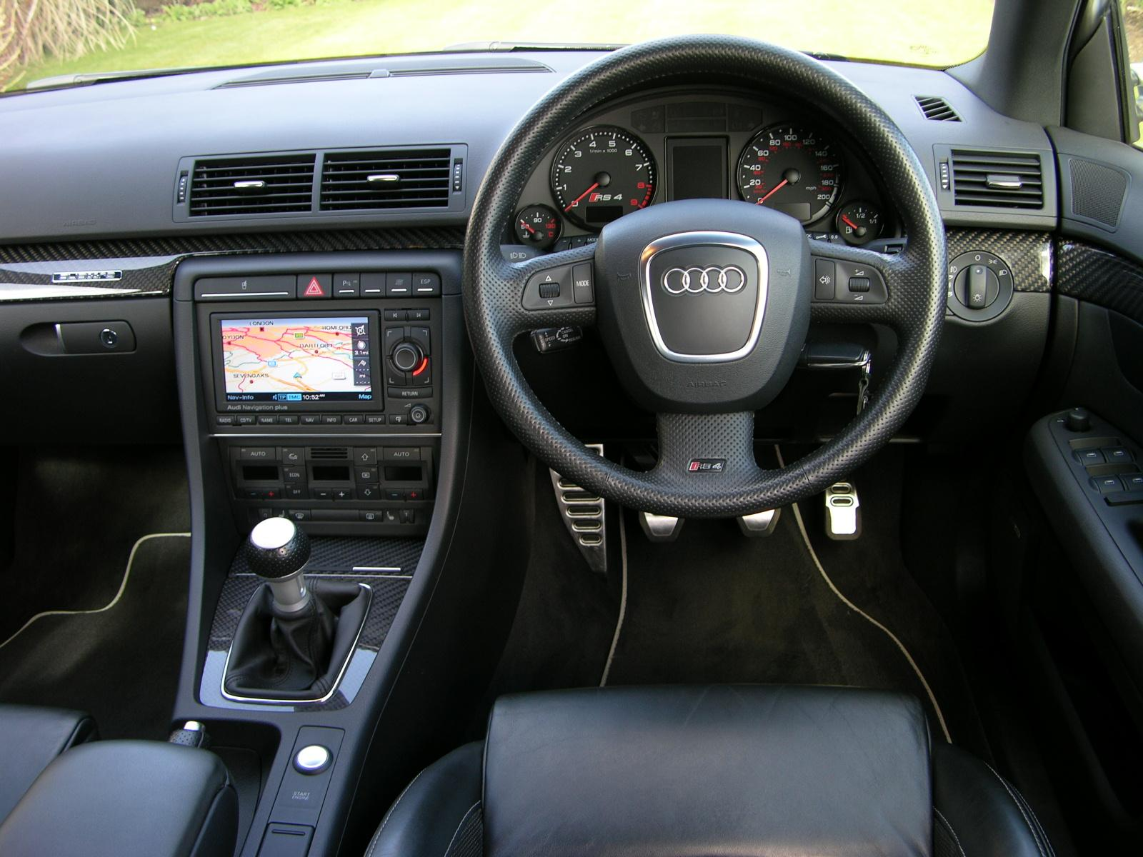 Intérieur de l'Audi RS4 B7